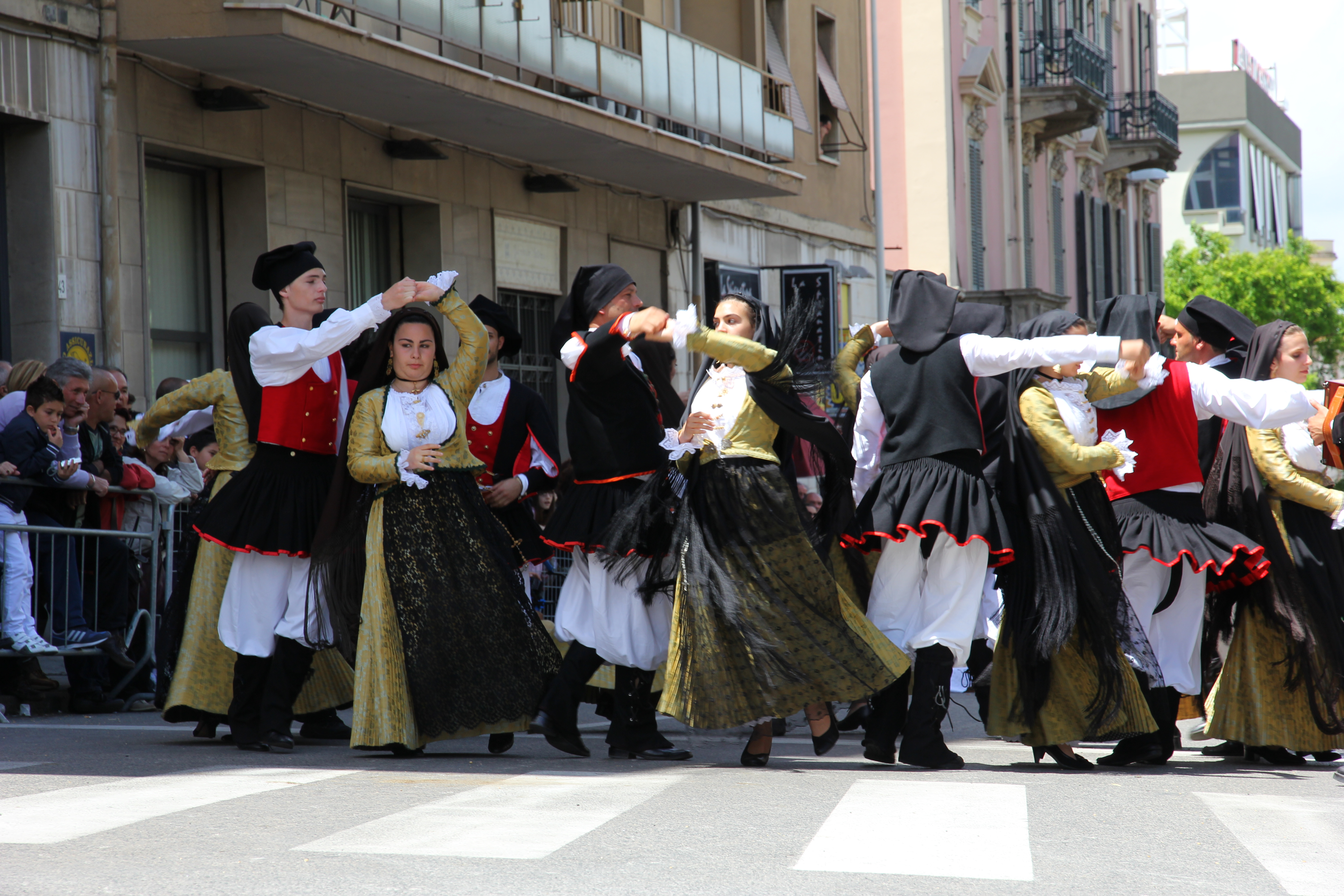 Cavalcata Sarda 2013 (Sassari)